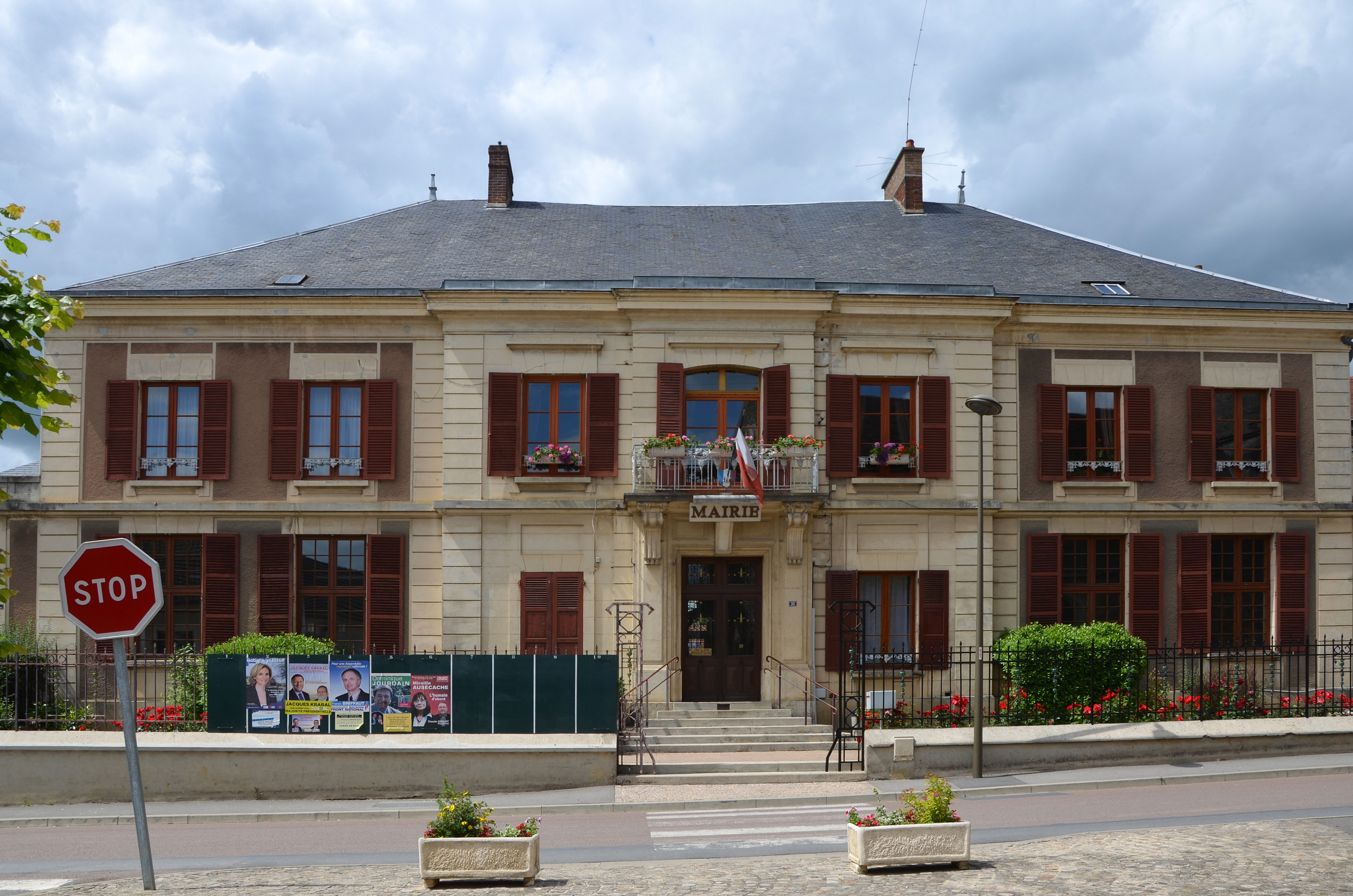 Mairie de Trélou-sur-Marne, Aisne, France